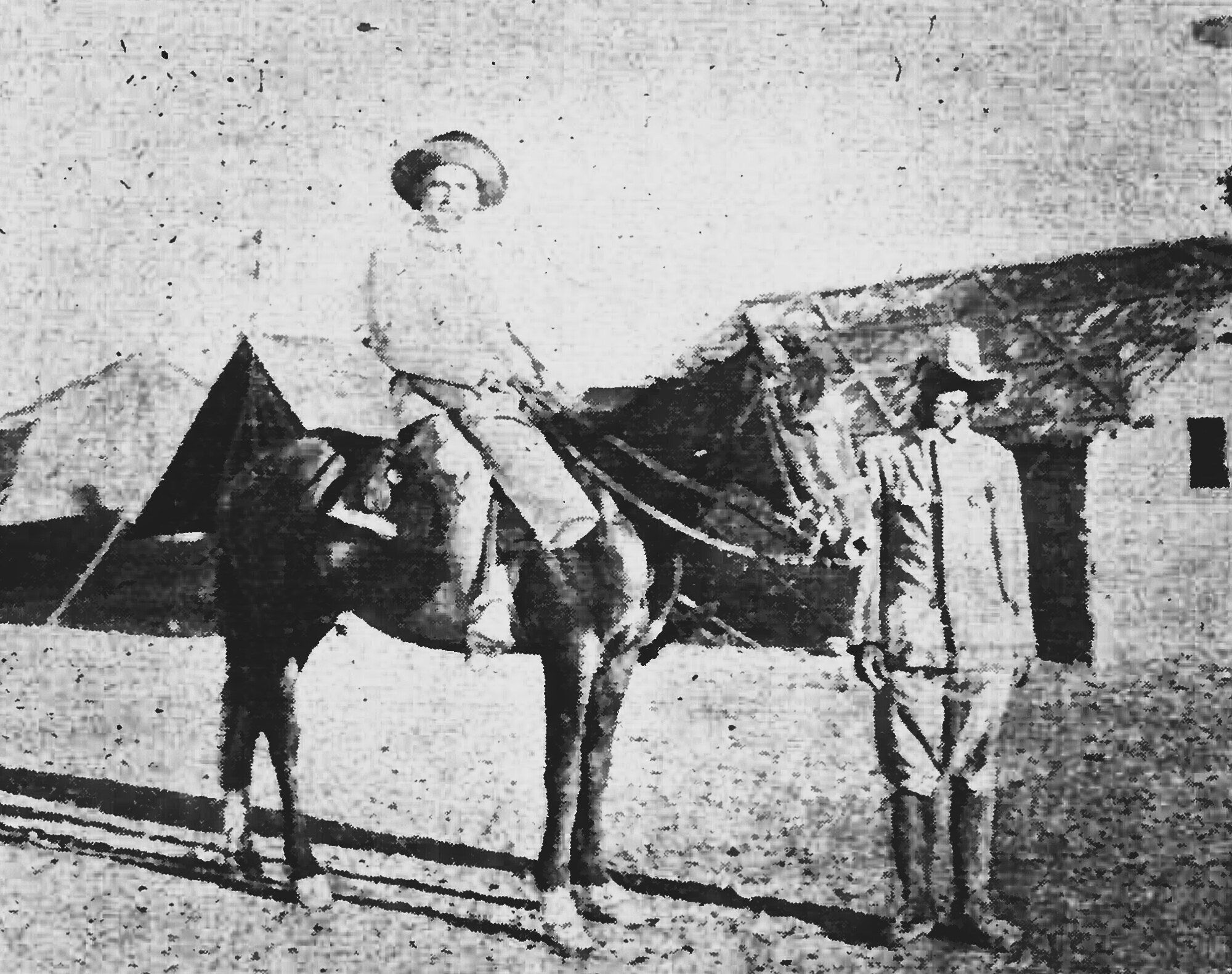 Dr. Otto Range, Kaiserliher Geologe in Lüderitzbucht. Entdecker der ersten Diamanten in Deutsch-Südwestarika.